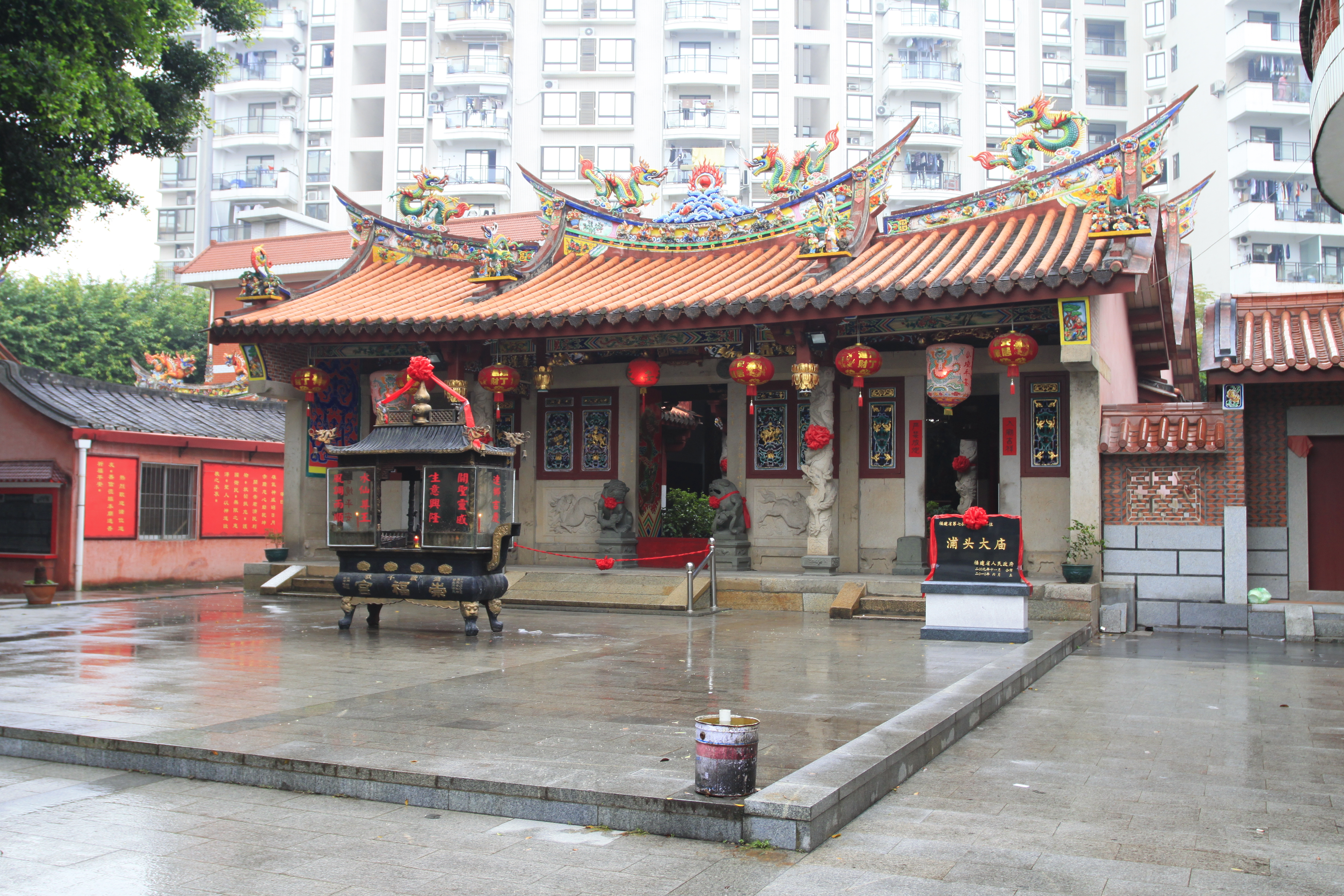 浦头大庙，位于中国福建省漳州市，是福建省文物保护单位。